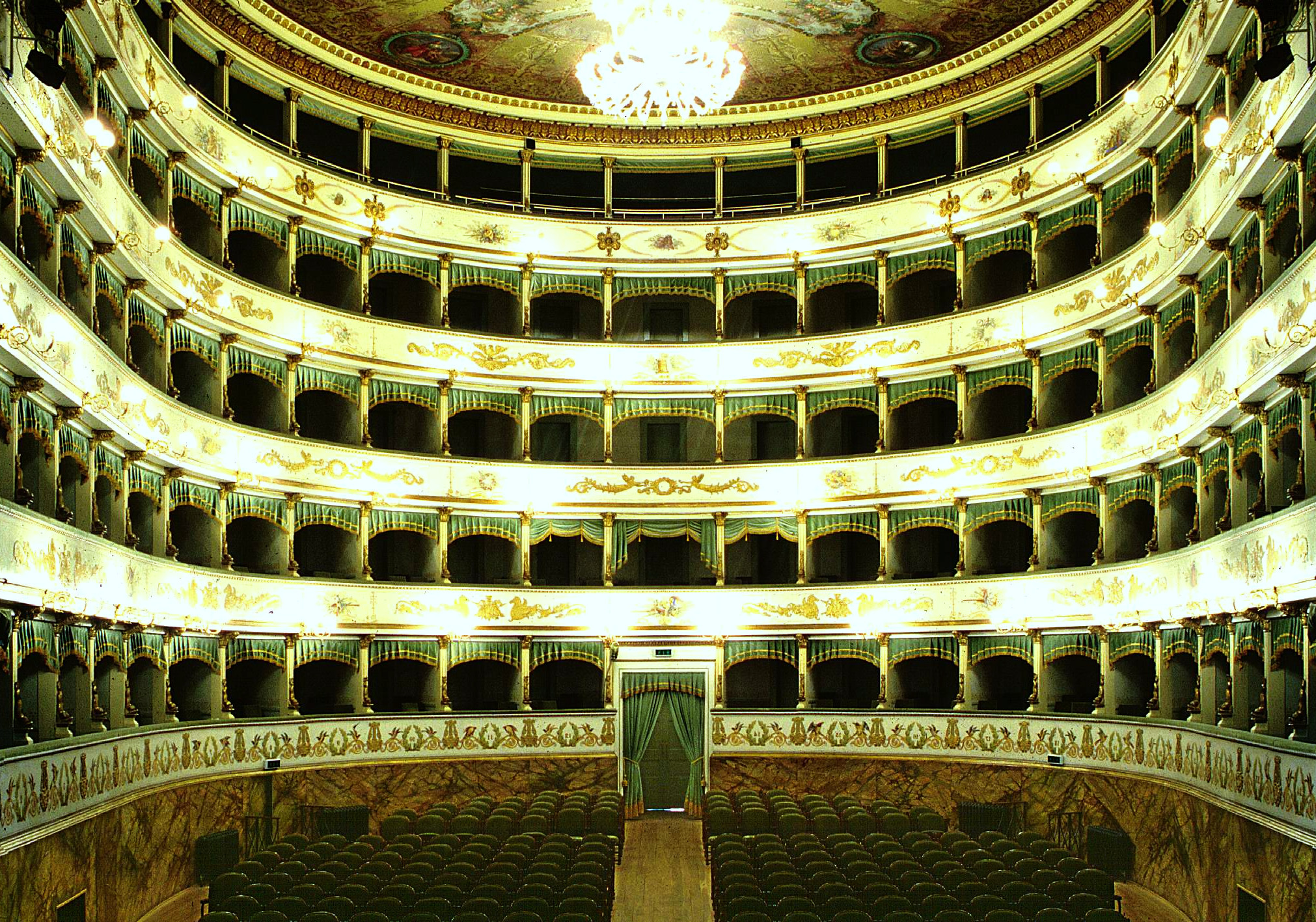 L'interno del Teatro A. Bonci